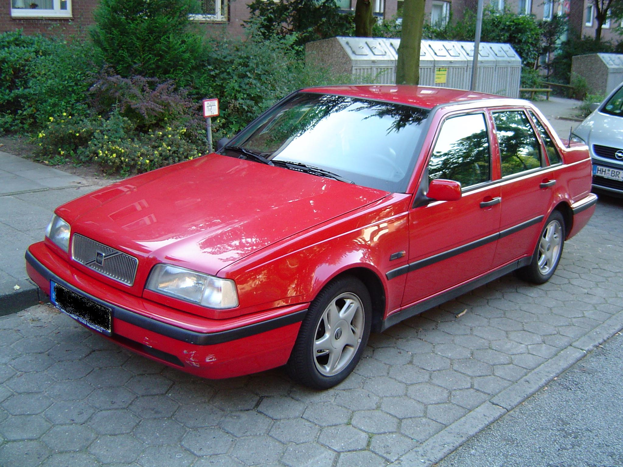 Mein Volvo 460